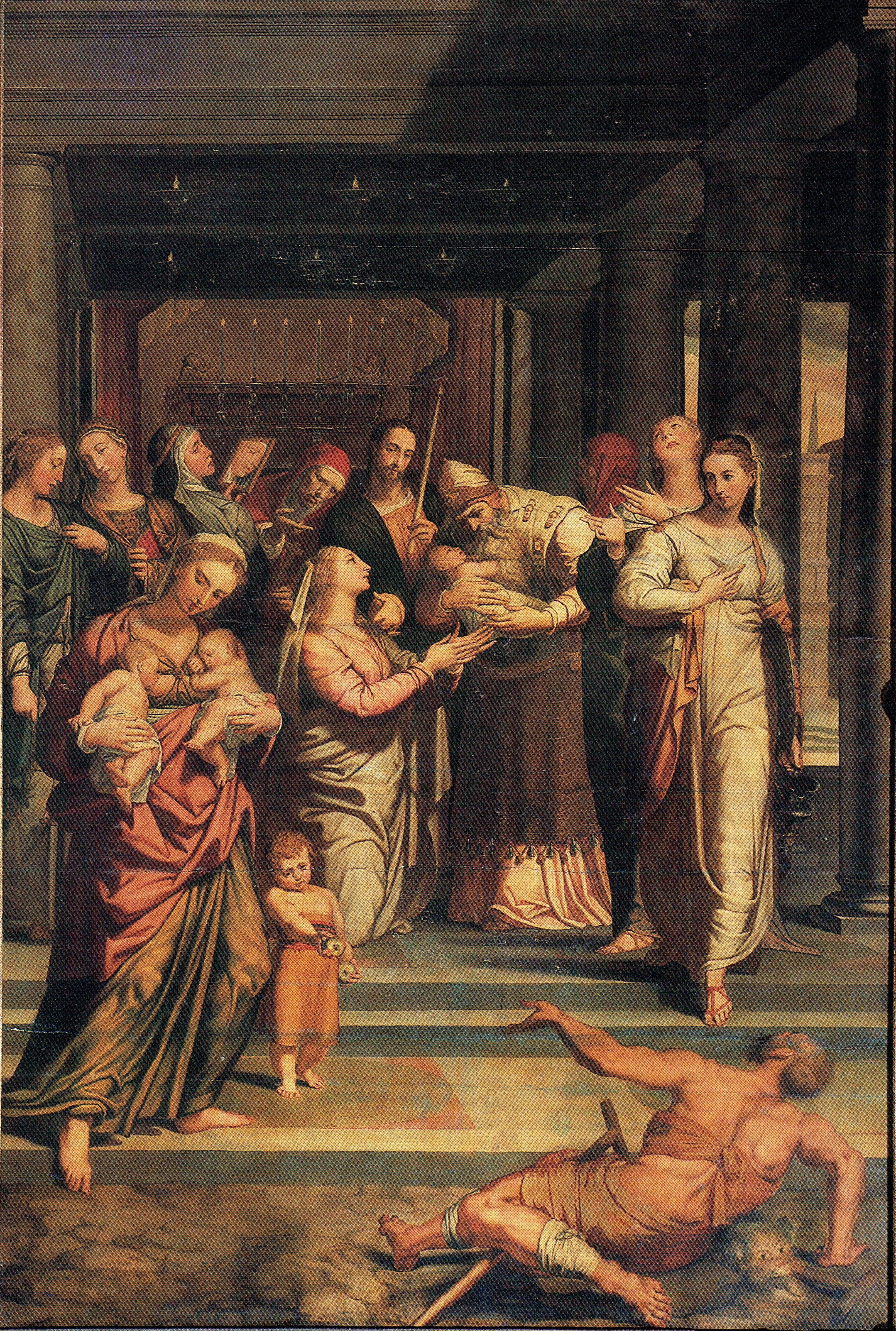 Esta obra, que está colocada en el retablo de la capilla del Mariscal de la catedral de Sevilla, (España), fue pintada hacia el año 1650 por el célebre pintor Francisco de Zurbarán.